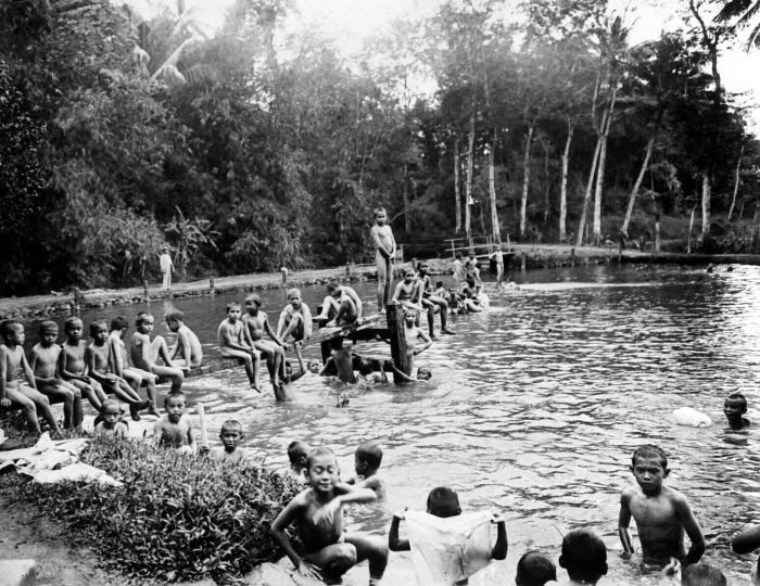 Repronegatief. De badplaats voor jongens van het tehuis Stichting 'Oranje Nassau', gesticht door vader Van der Steur te Magelang, Java, voor de opvang van soldatenkinderen